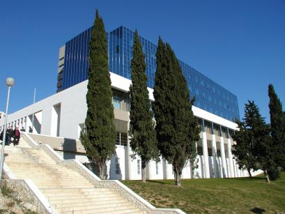 Wirtschaftswissenschaftliche Fakultät der Universität Split